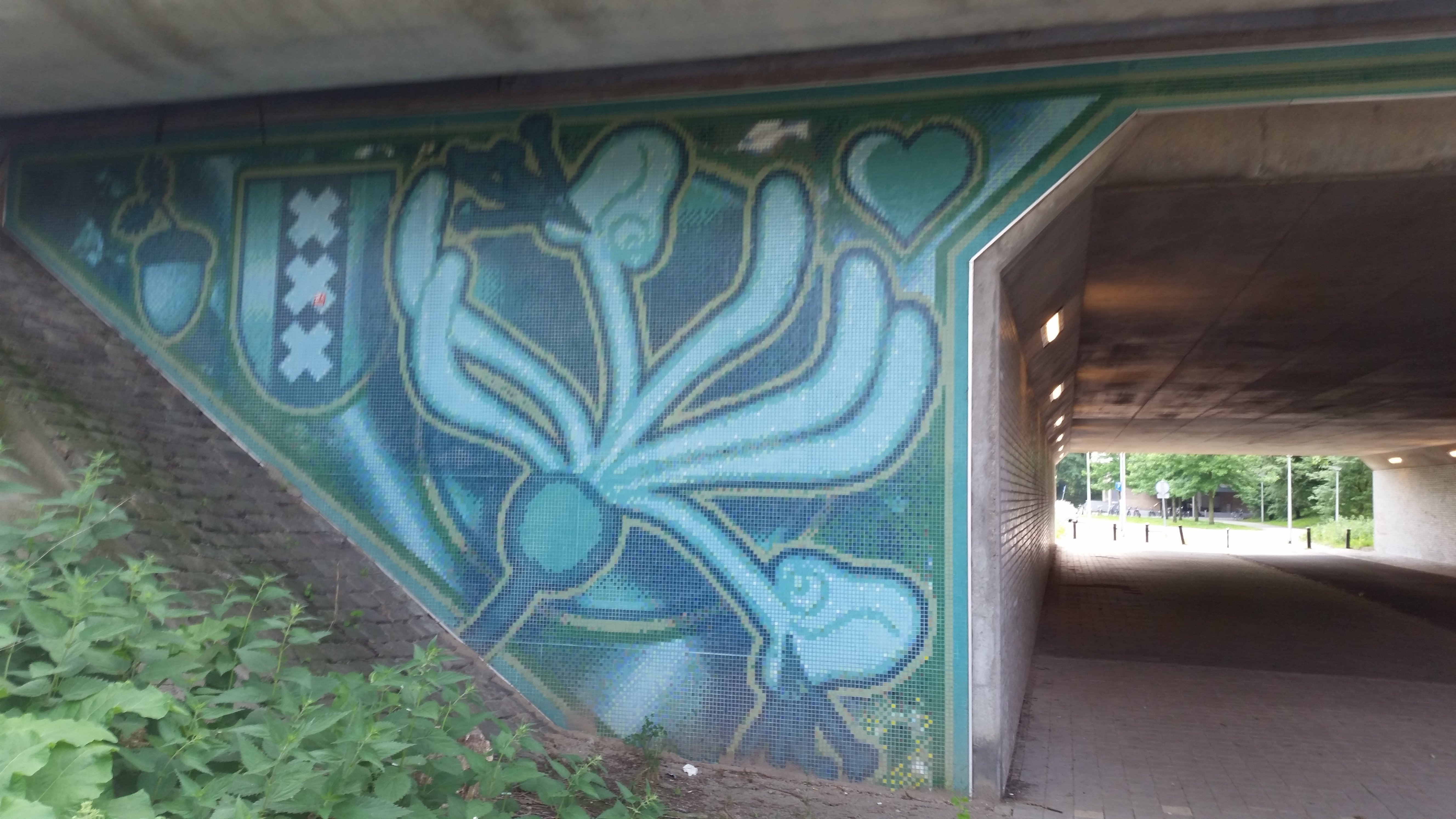 Wandmozaiek nachtwachtbrug, Amsterdam Nieuw-West